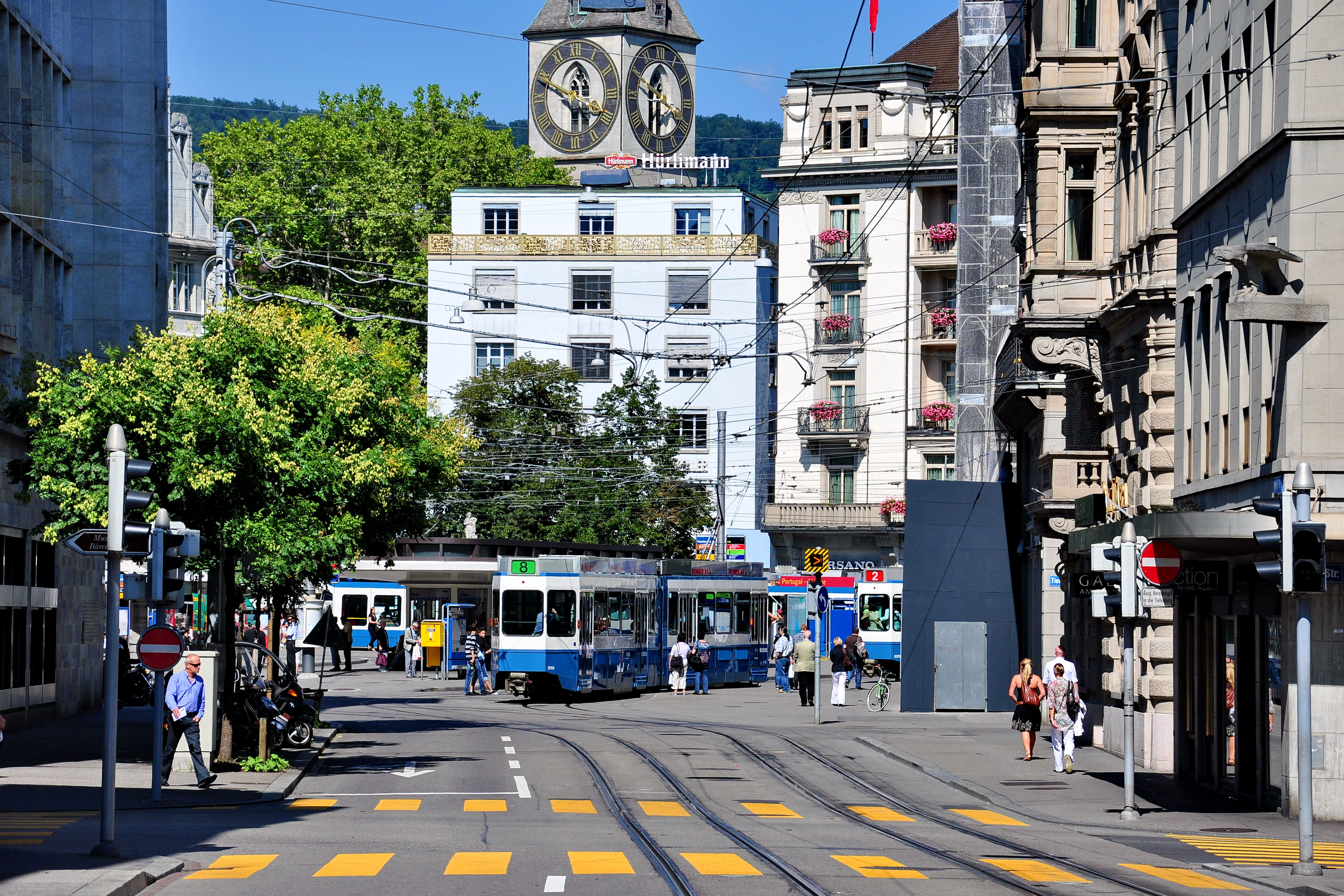 Paradeplatz and Zeughauskeller in Zürich (Switzerland) as seen from Bleicherweg